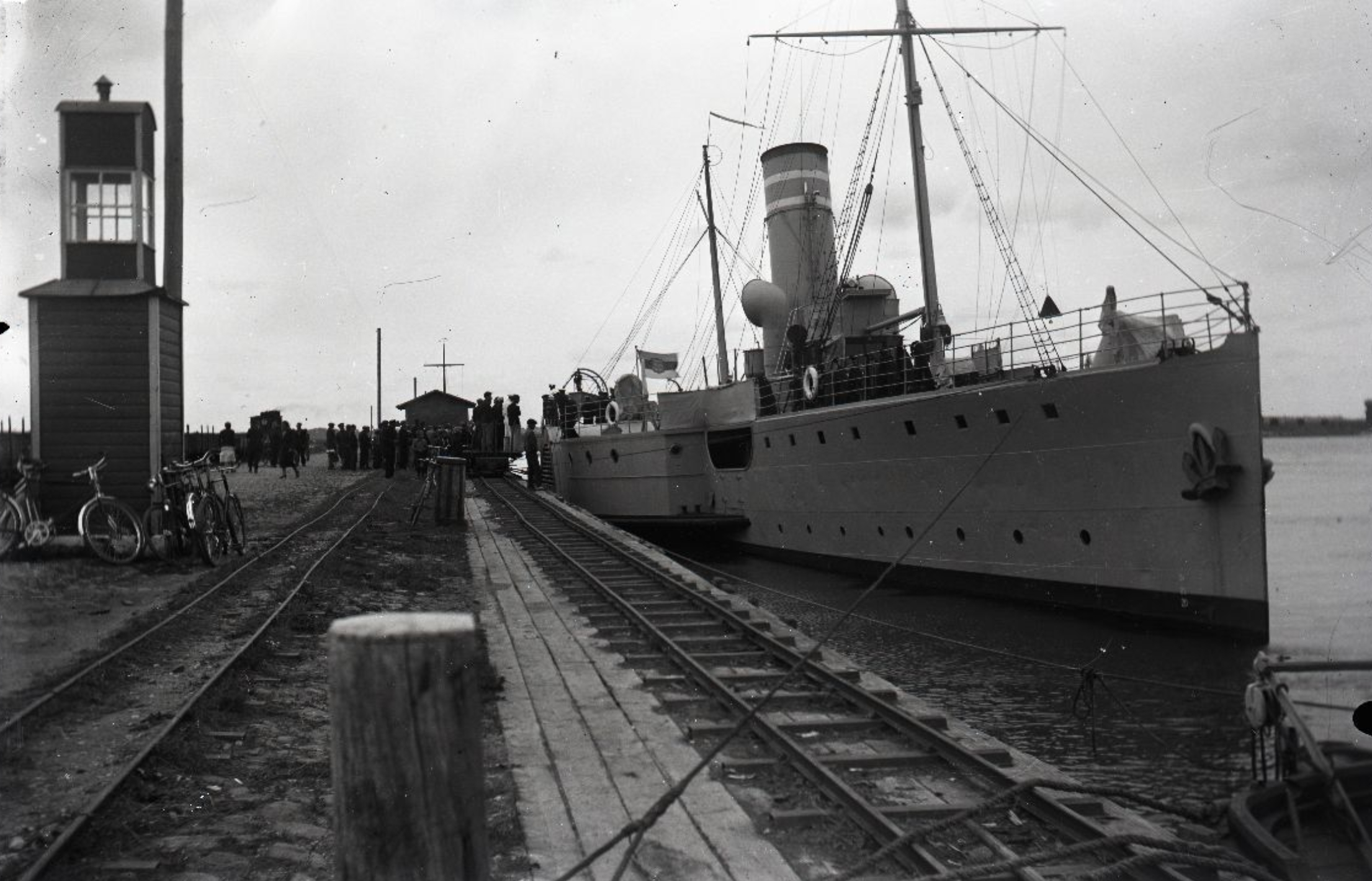 Miiniveeskja Ristna Roomassaare sadamas